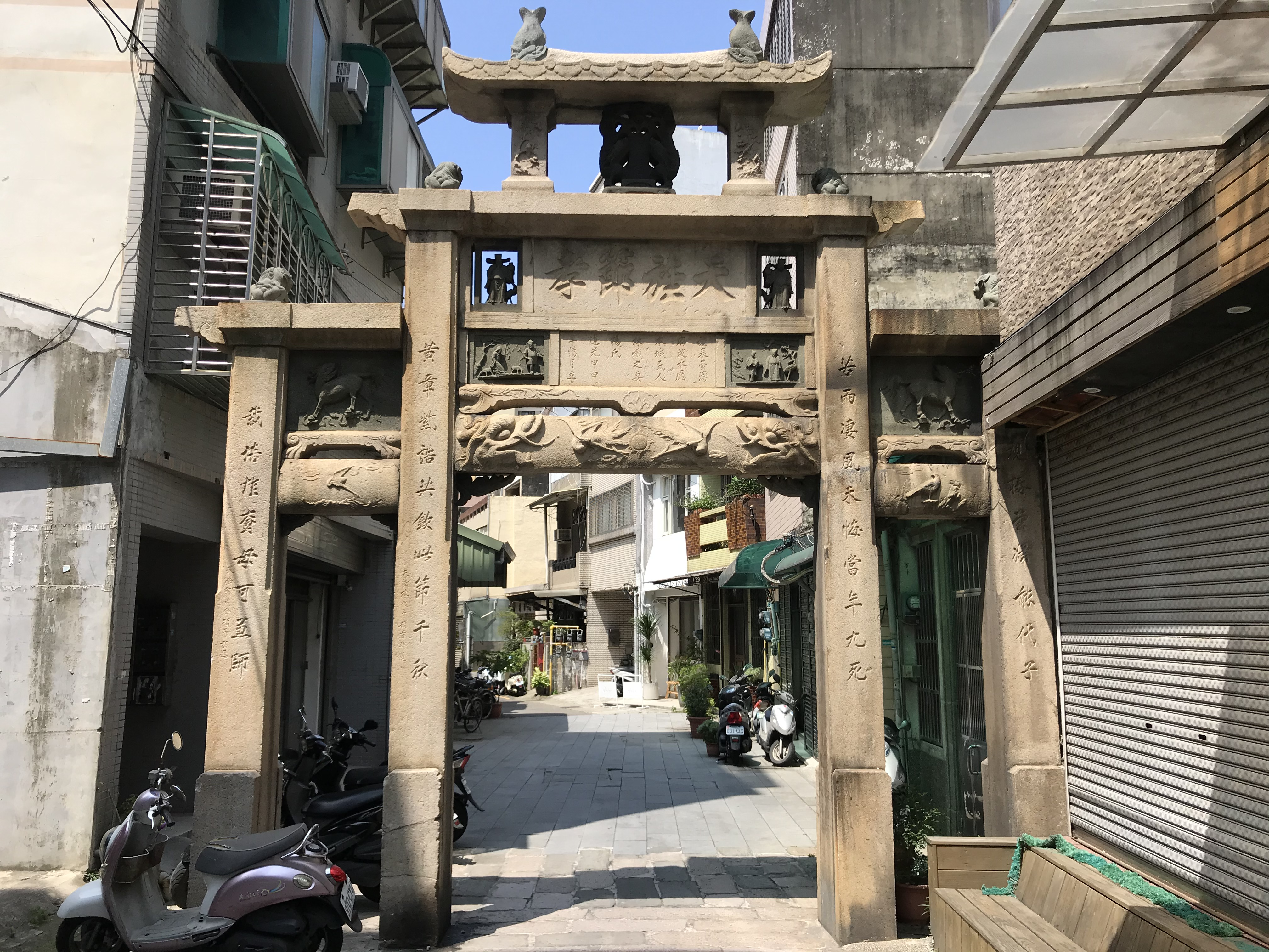 中文（台灣）: 楊氏節孝坊背面照